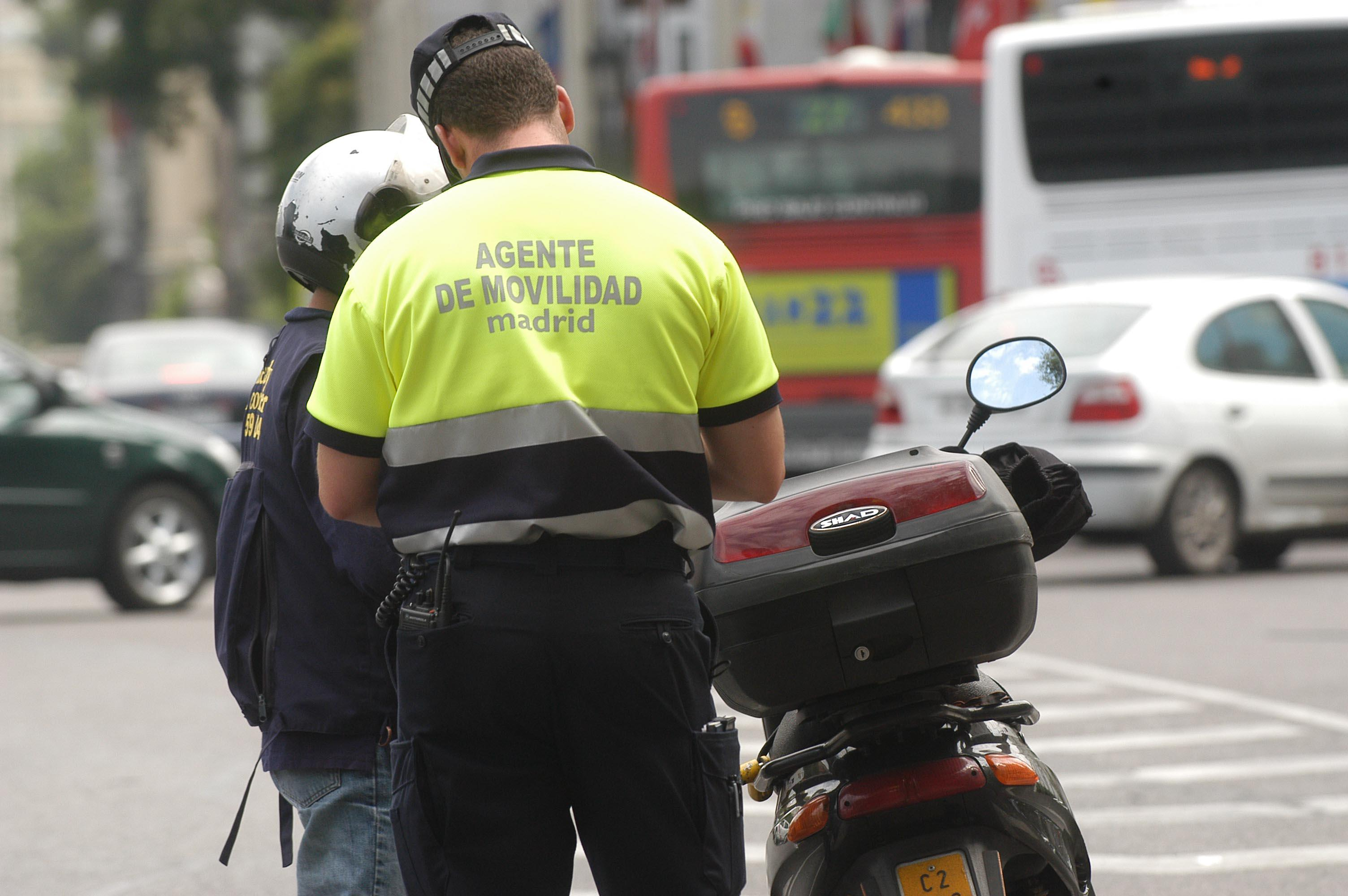 El Pleno municipal celebrado hoy, miércoles 31 de enero, ha aprobado la modificación puntual del Reglamento de Agentes de Movilidad para favorecer la promoción interna y la carrera profesional de estos funcionarios dentro de este Cuerpo, con el apoyo de Ahora Madrid, PSOE y Ciudadanos, y la abstención del PP.